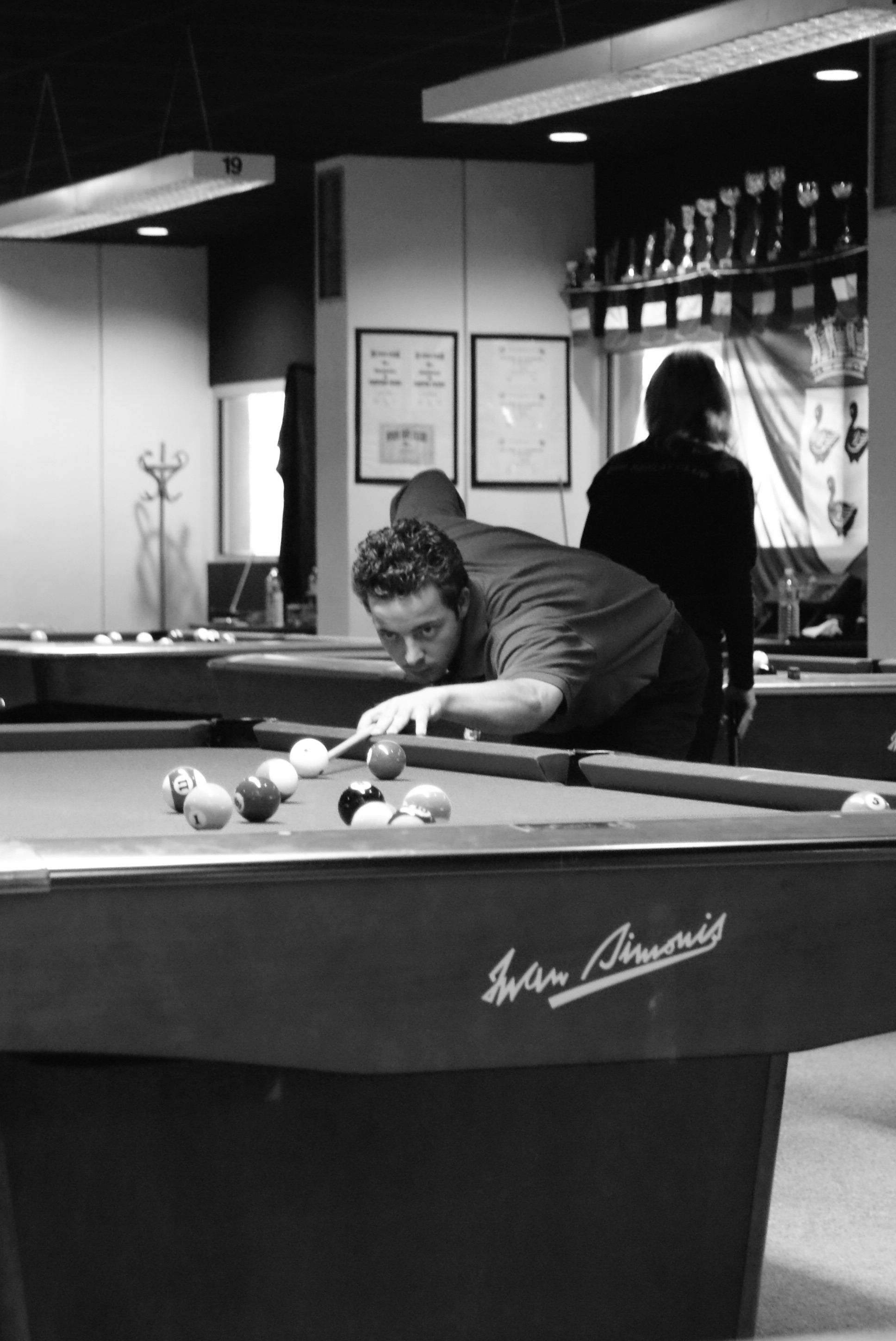 Pool player